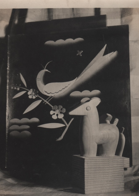 Petite glace gravée (oiseau sur branche) et petite sculpture (animal) en sycomore, oeuvres de Pierre Lardin.